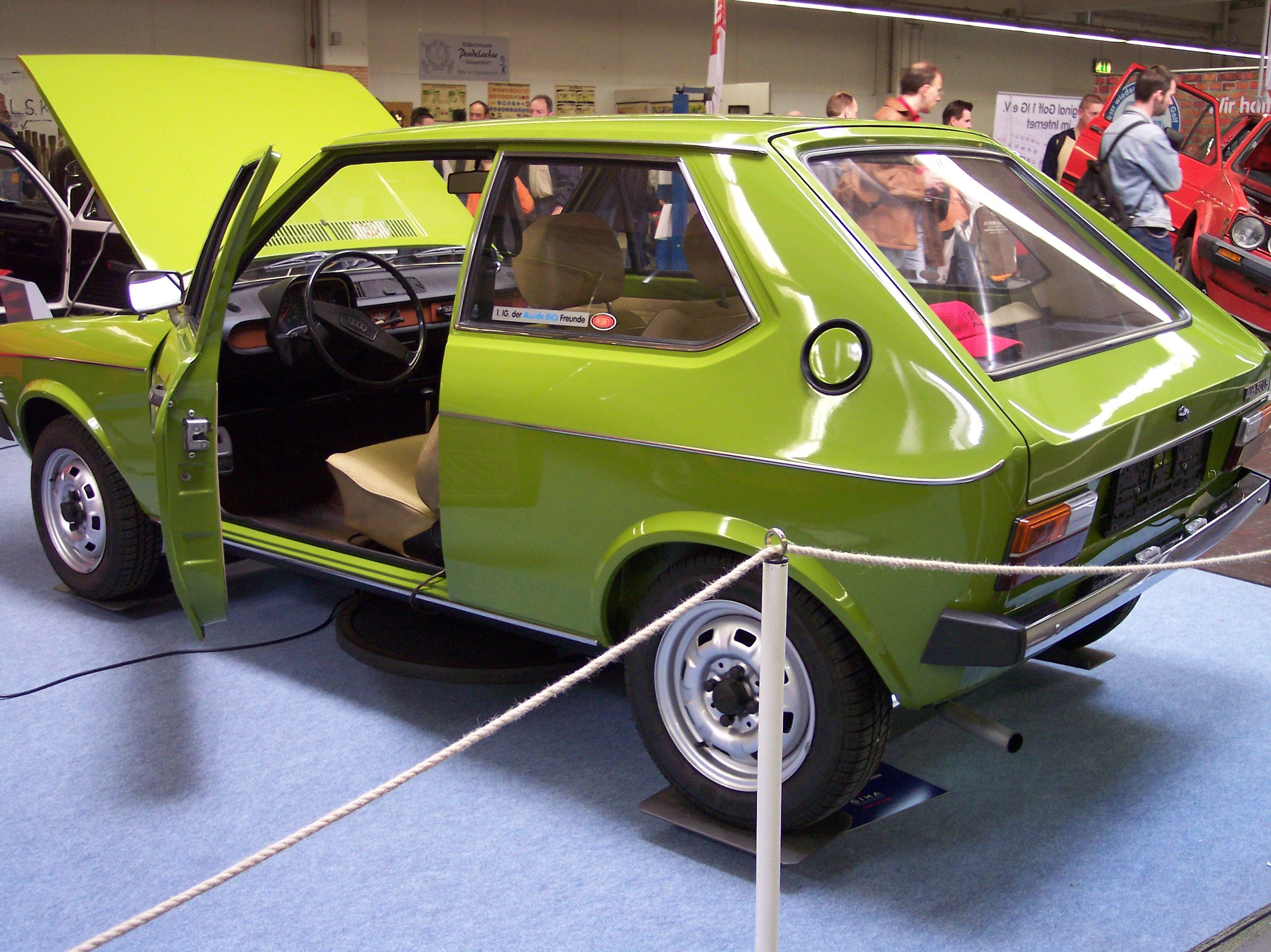 Audi 50 LS 1974